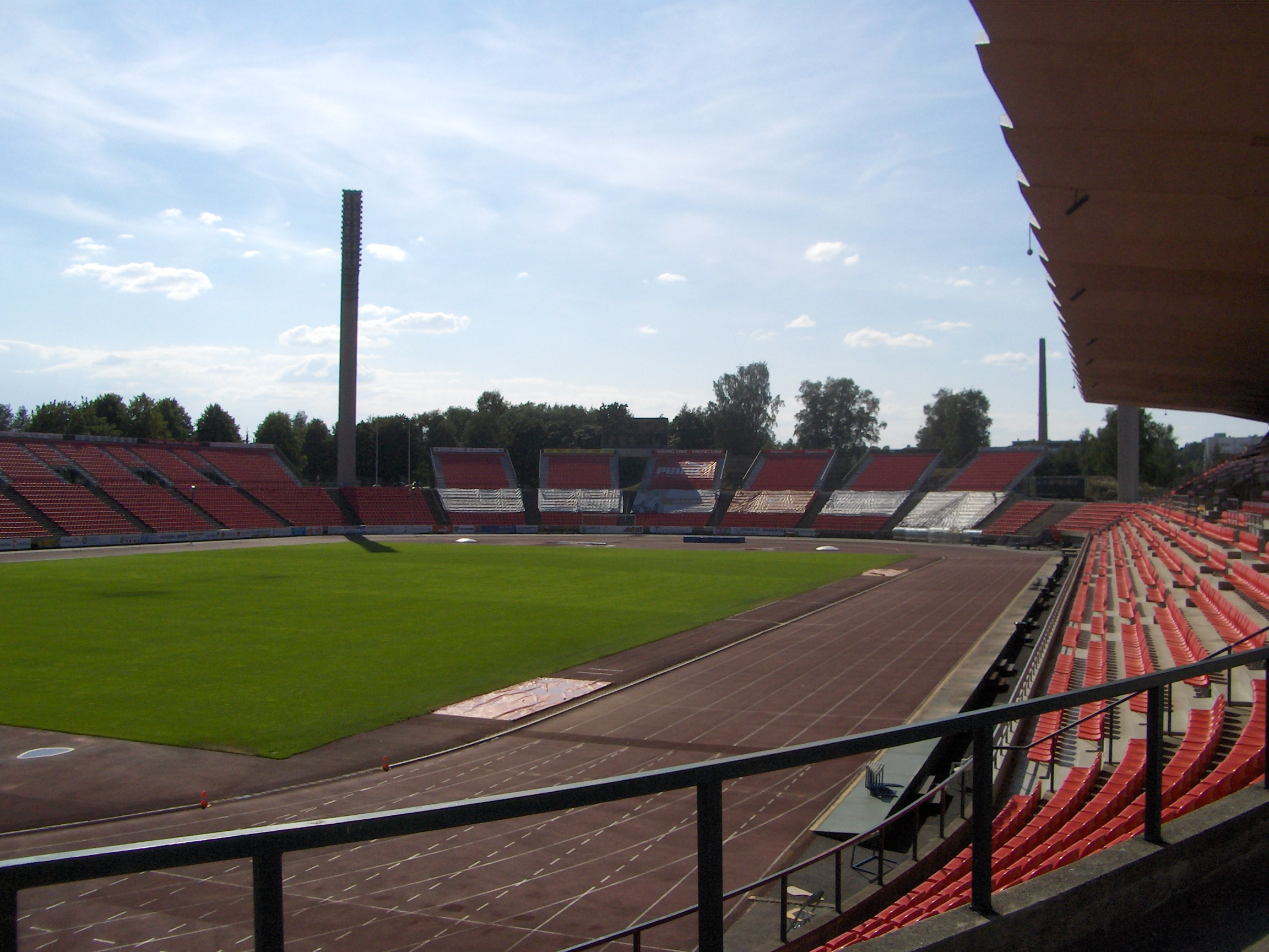 Tampere stadium